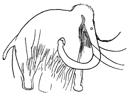 Mammouth gravé de la grotte des Combarelles (Dordogne, France)